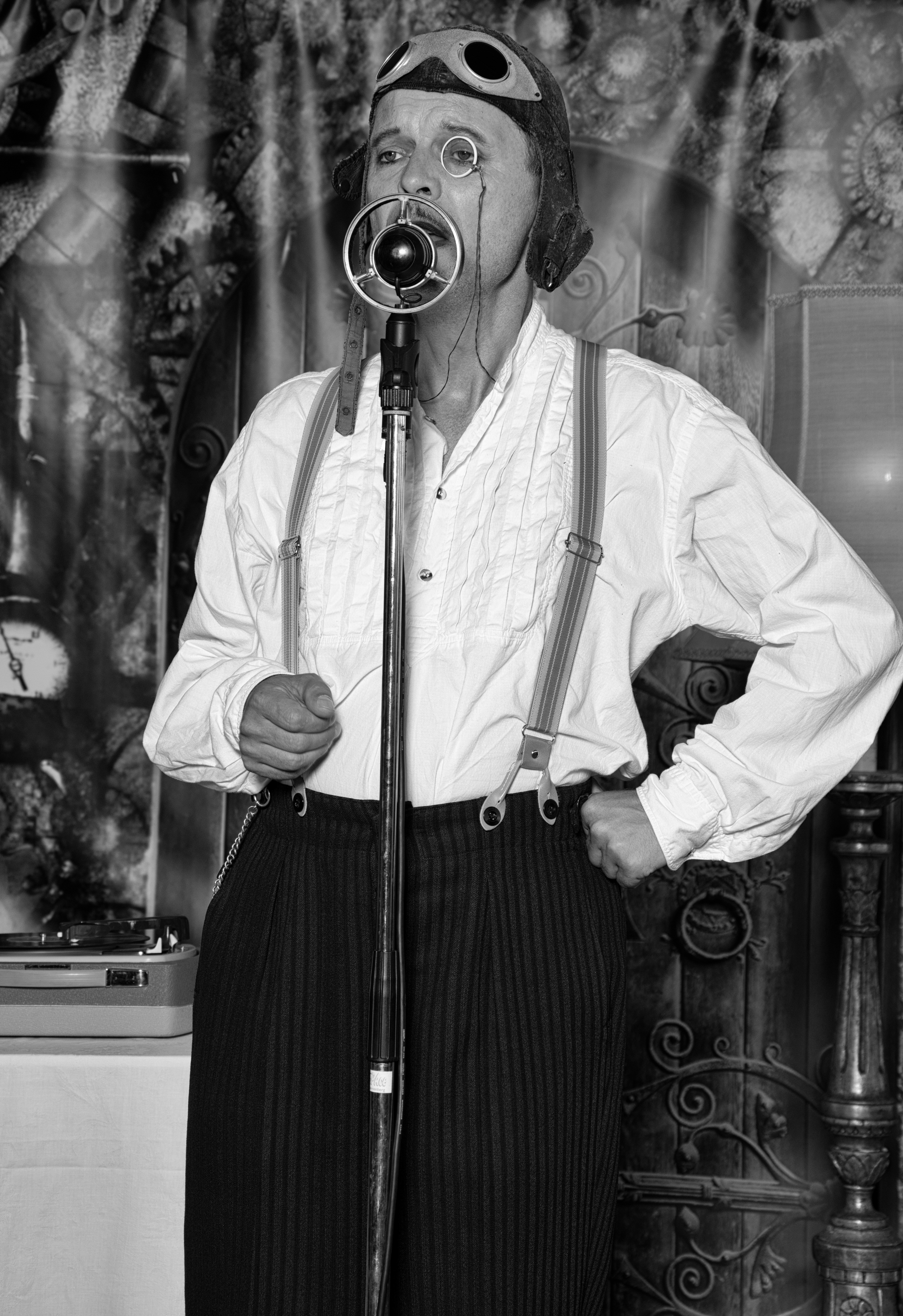 Daniel Malheur Schweiz 2019